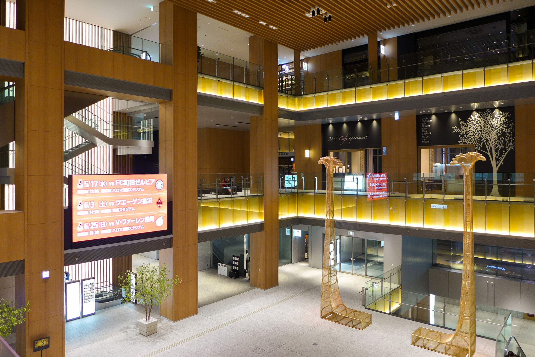 KITTE Nagoya